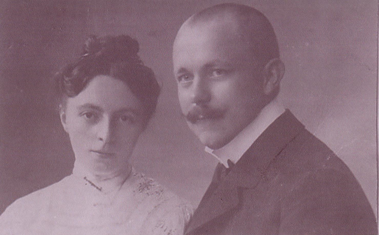 Porträtfotografie des Ehepaars Marie geb. Kospoth und Johannes Döhler